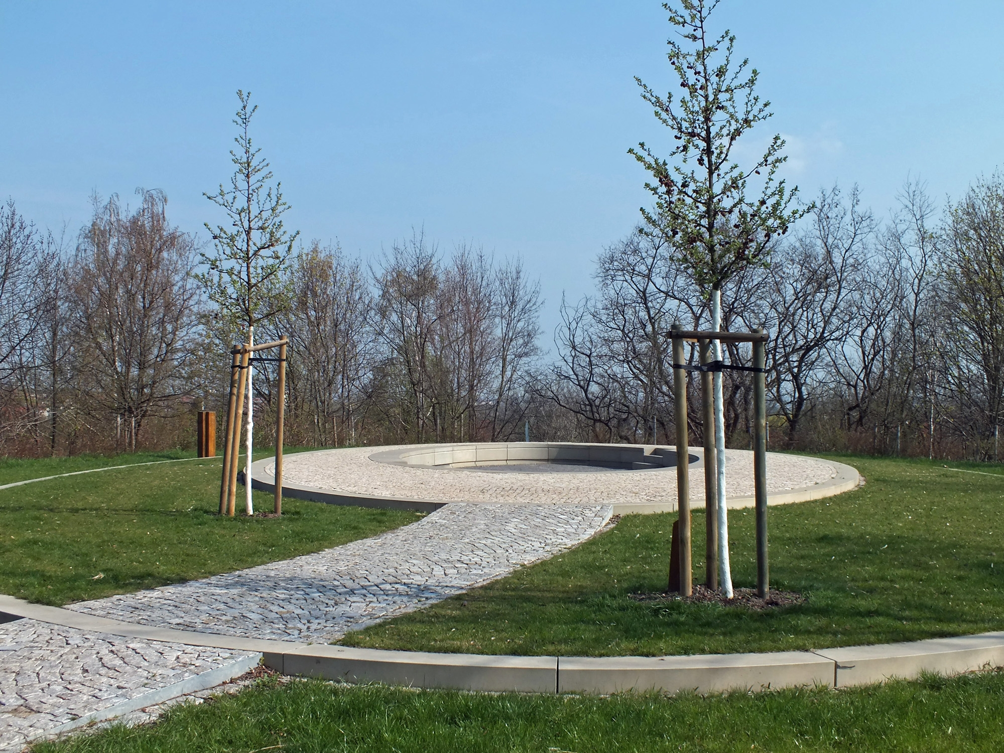 Der Gedenkort für die Paulinerkirche im Park an der Etzoldschen Sandgrube in Leipzig-Ptobstheida